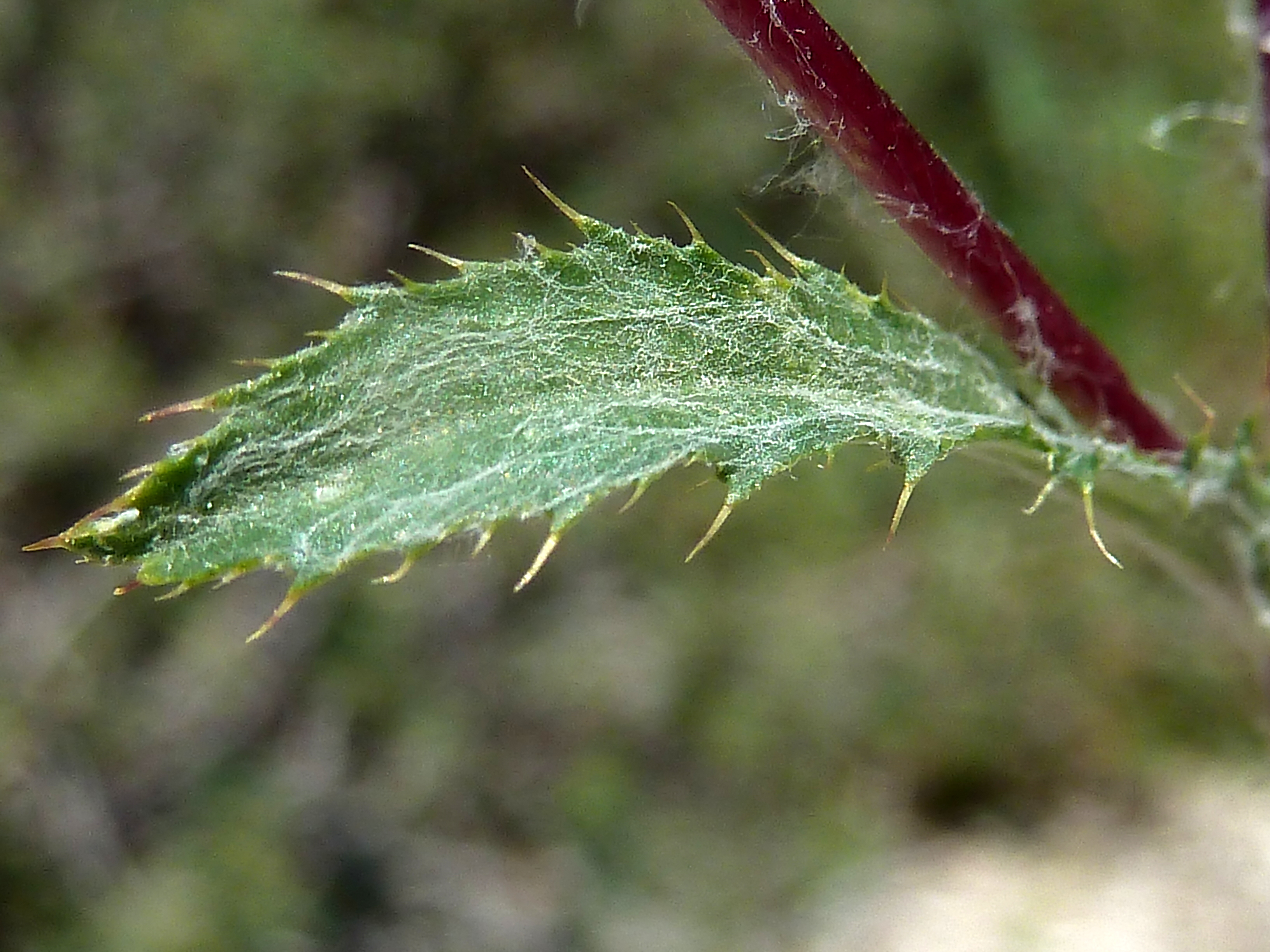 Atractylis cancellata (cancelillos, cardo enrejado,...) - Hoja caulinar sentada araneosa y espinosa: vista subcenital . - circa Villa Suzana, Colonia Illicitana, Albatera (Provincia de Alicante, España).